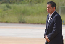 O já ex-presidente do Equador Lucio Gutiérrez chega à Base Aérea de Brasília.